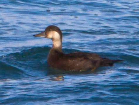 Black Scoter (Melanitta nigra) Hrafnsönd, Iceland